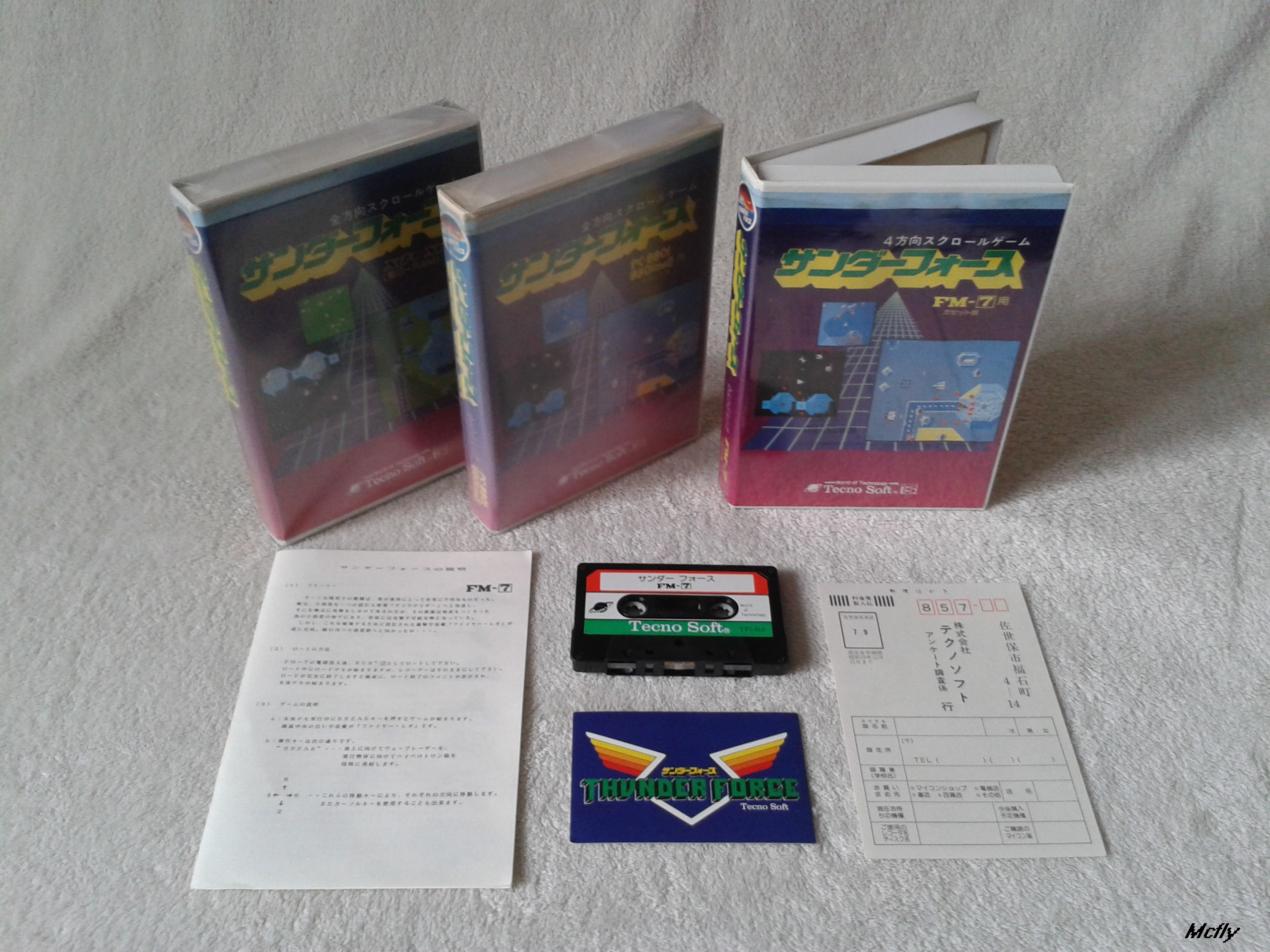 tf1 sharp x1, fm7, nec pc8801